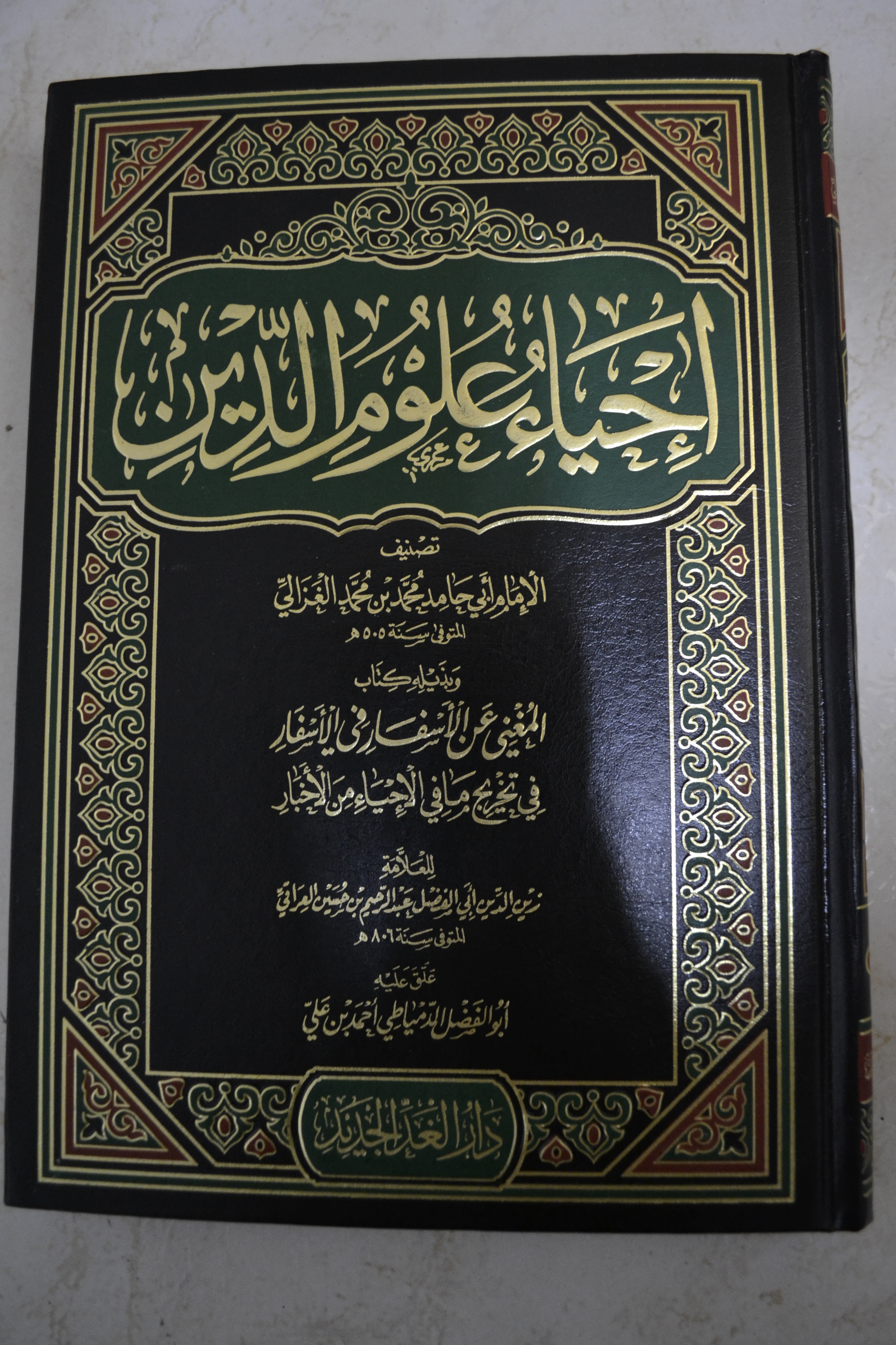 Ihya 'Ulumuddin merupakan Kitab yang membahas tentang Fikih dan Tasawuf, ditulis oleh Imam al-Ghazali